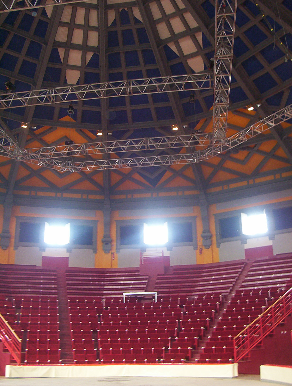 Cirque municipal d'Amiens : gradins.